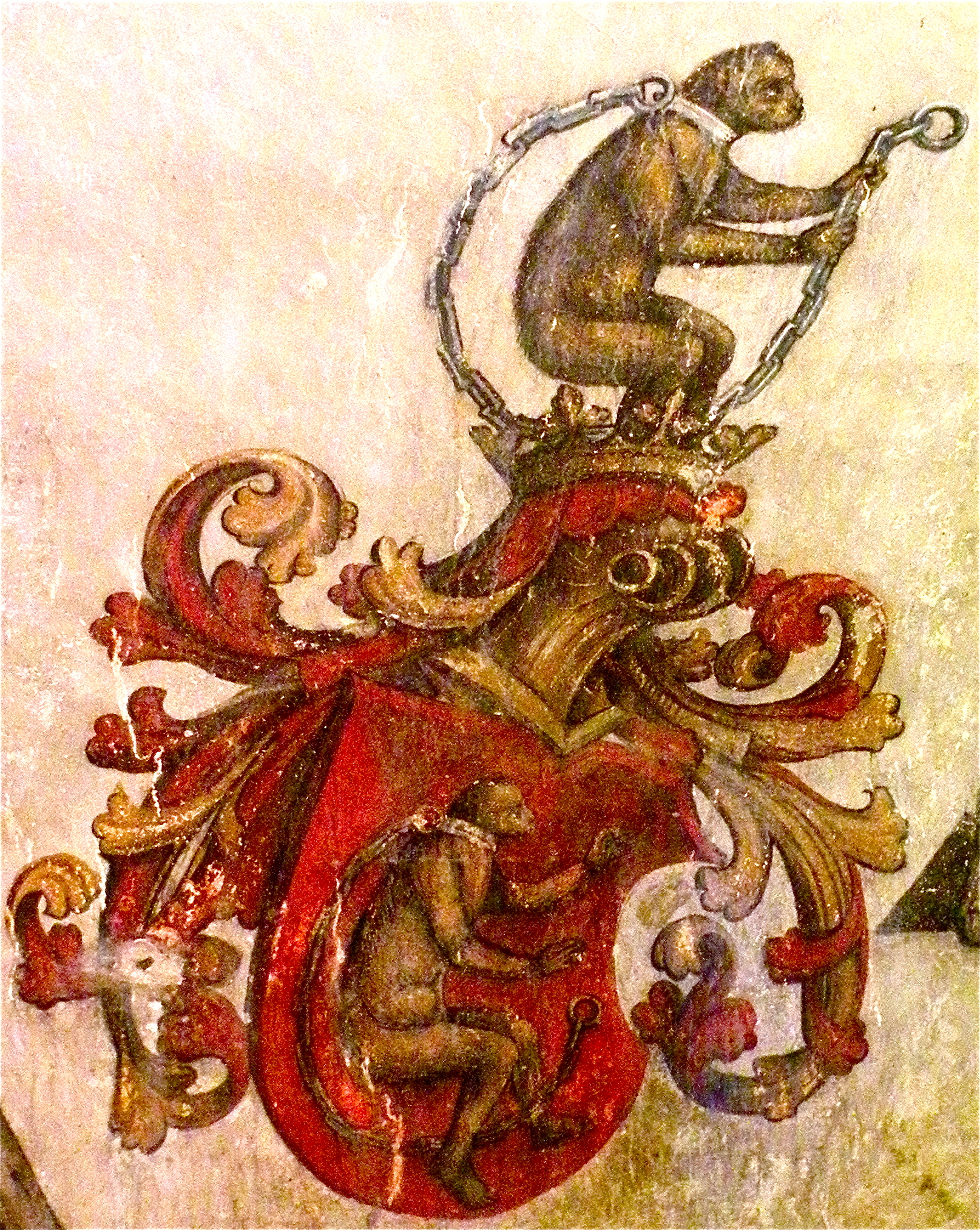 Originalfresko vom Beginn des 16. Jahrhunderts mit dem Wappen des Ladislaus Prager in der Gruft der Filialkirche von Altenburg bei Windhaag im Bezirk Perg in Oberösterreich